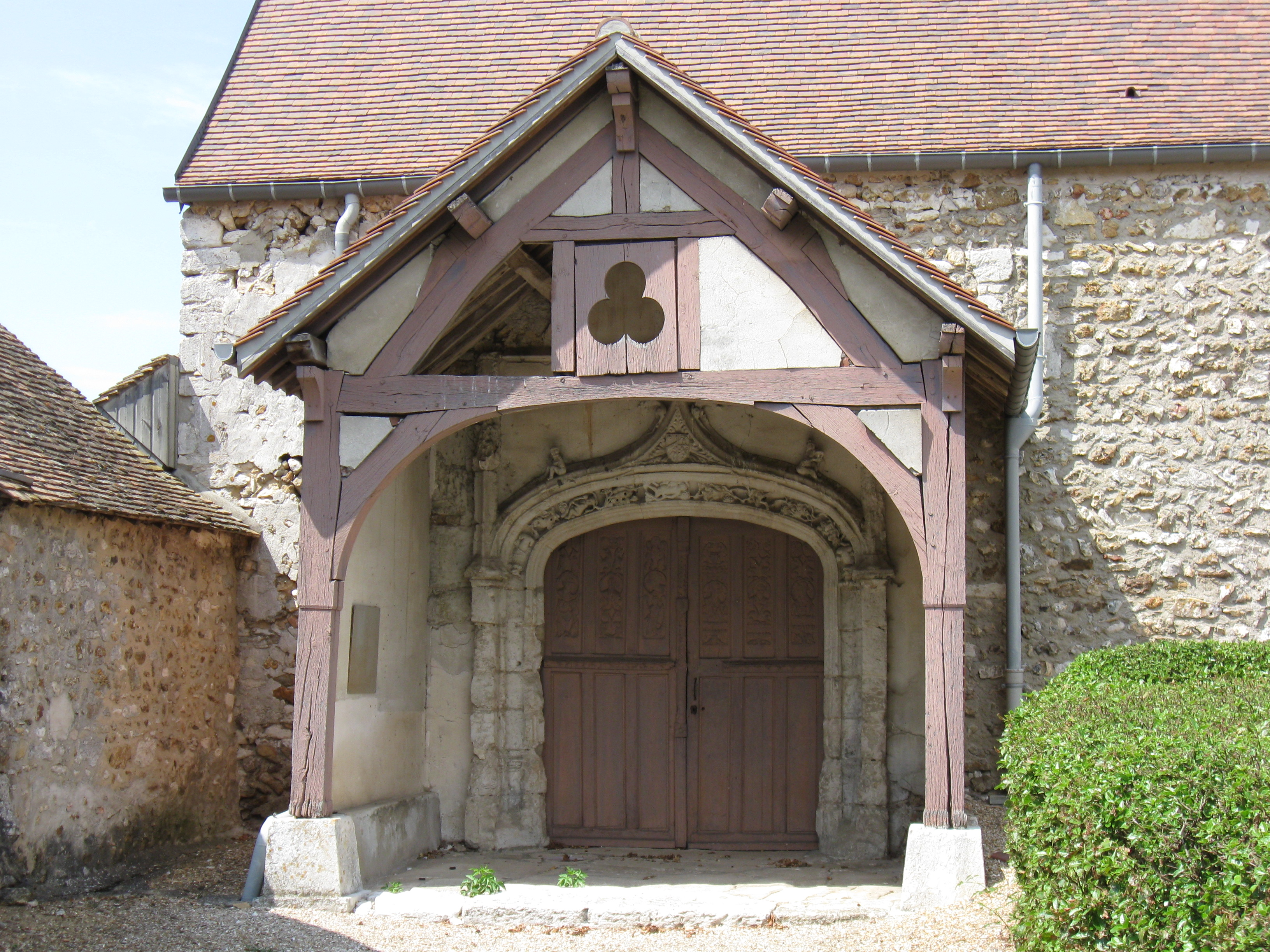 Portail de l'église Saint-Hilaire de Saint-Illiers-la-Ville. (Yvelines, région Île-de-France).